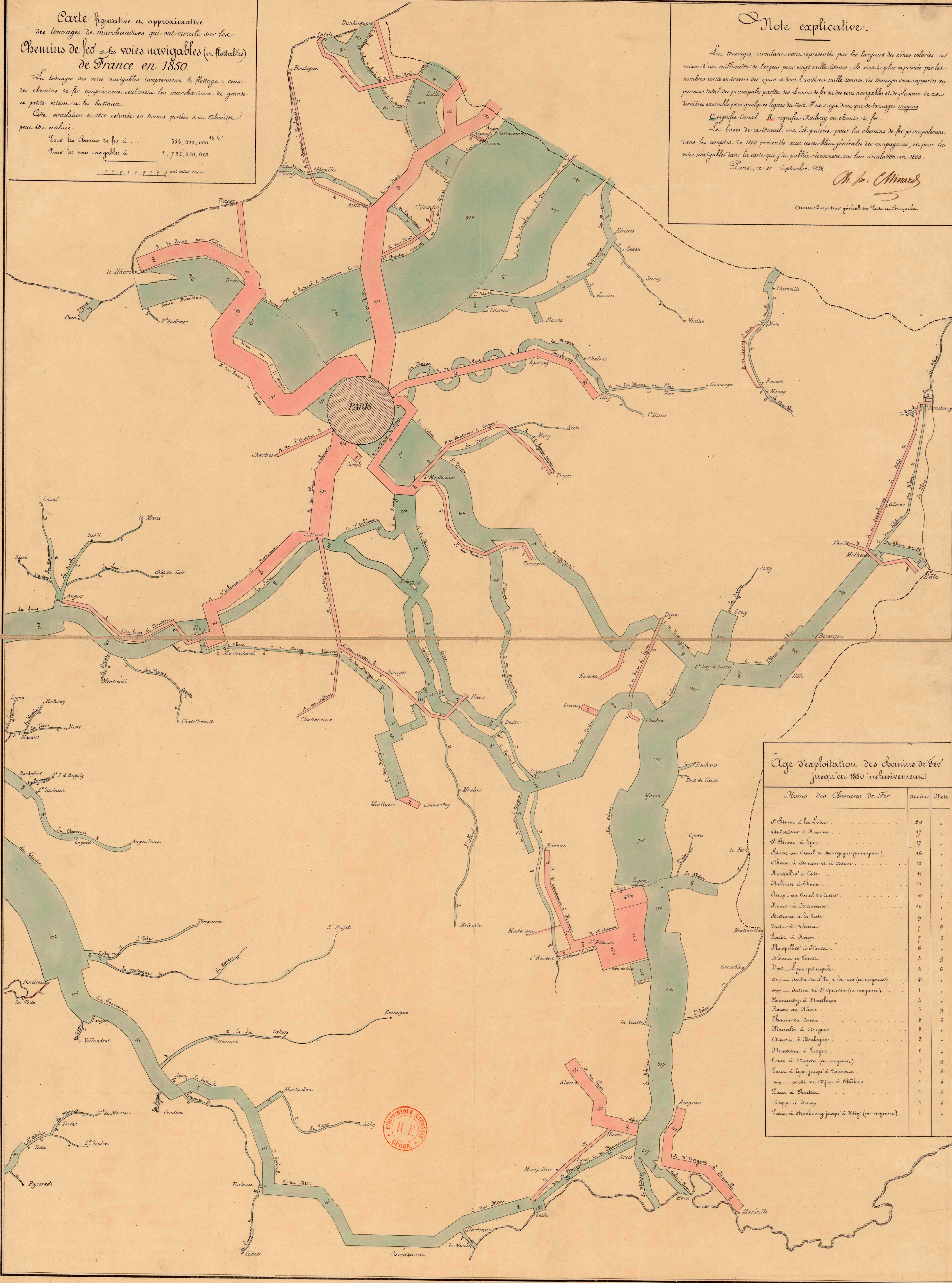 Bibliothèque Nationale de France (BNF) Auteur : Minard, Charles-Joseph (1781-1870). Éditeur : impr. de Gratia (Paris) Date d'édition : 1852 Sujet : France - Statistique - Chemins de fer Sujet : France - Voies navigables Type : carte Droits : domaine public Identifiant : ark:/12148/btv1b53060766w